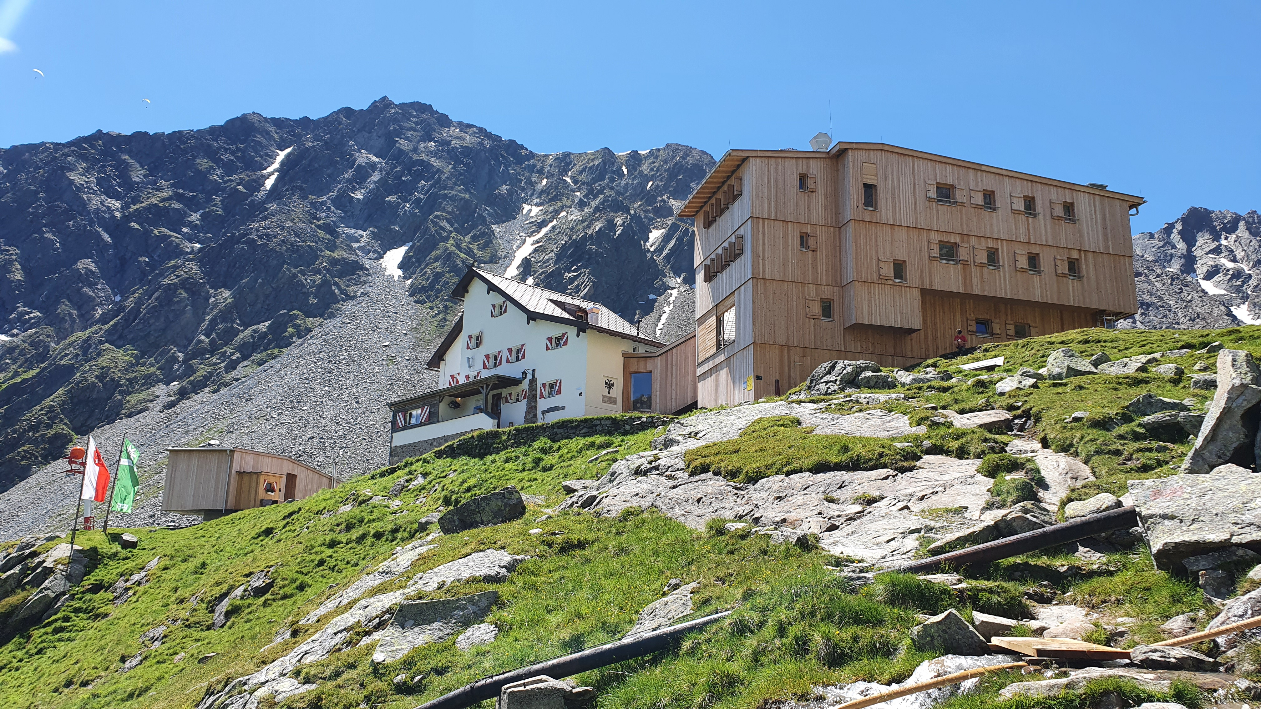 Neue Regensburger Huette des Deutschen Alpenvereins (DAV) im Stubaital, Tirol, Österreich. Blick von Osten